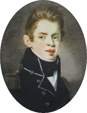 Fredrik August Lidströmer